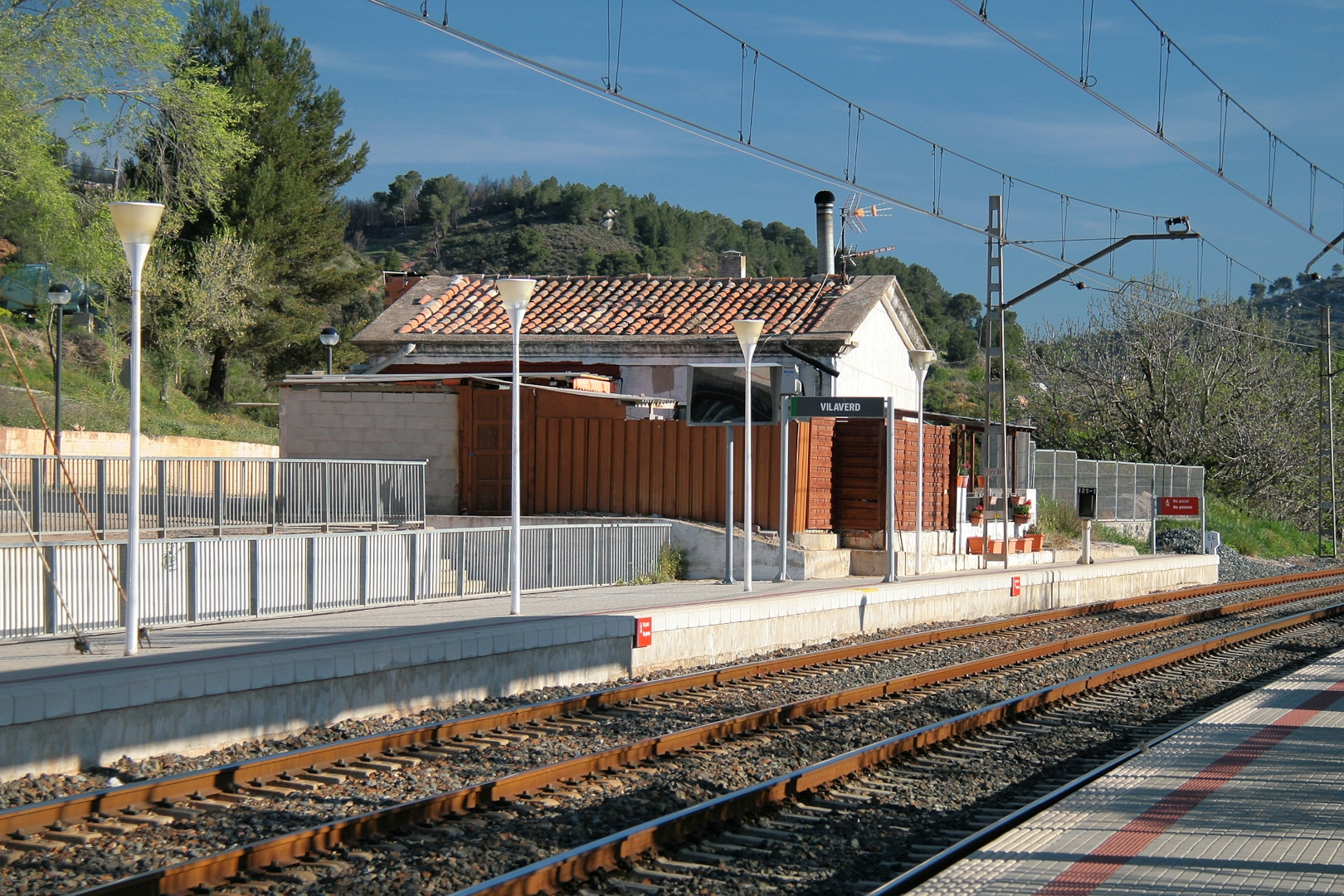 Estación de Vilaverd.